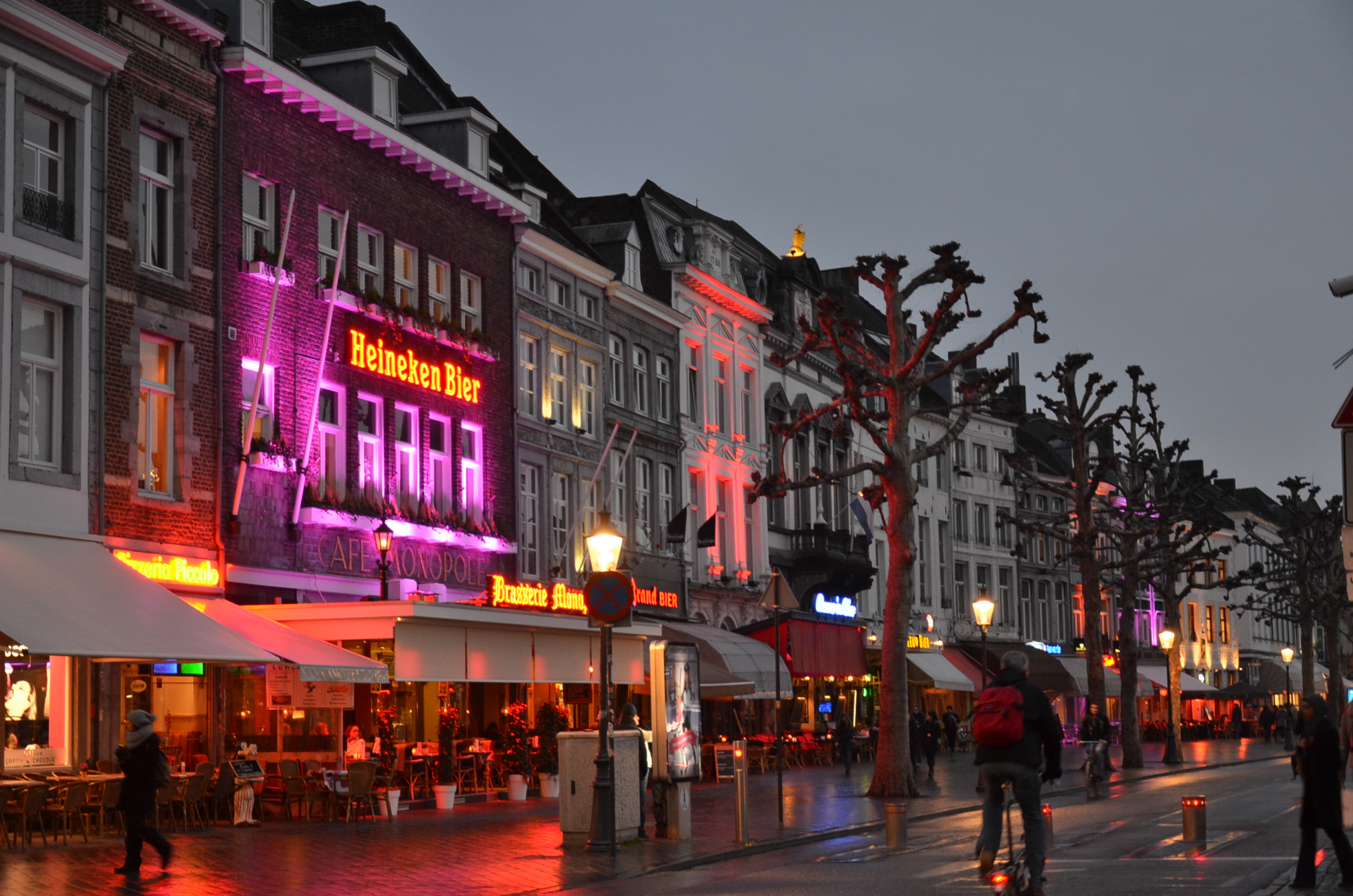 Rynek Maastricht